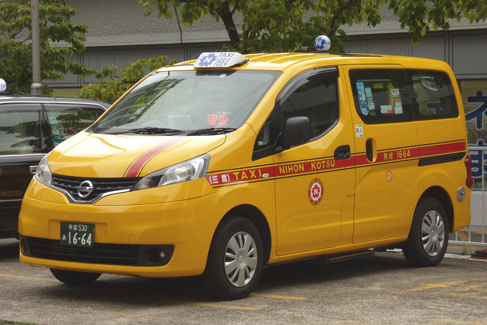 日本交通株式会社の「四社カラー」の、日産・NV200バネットタクシー。